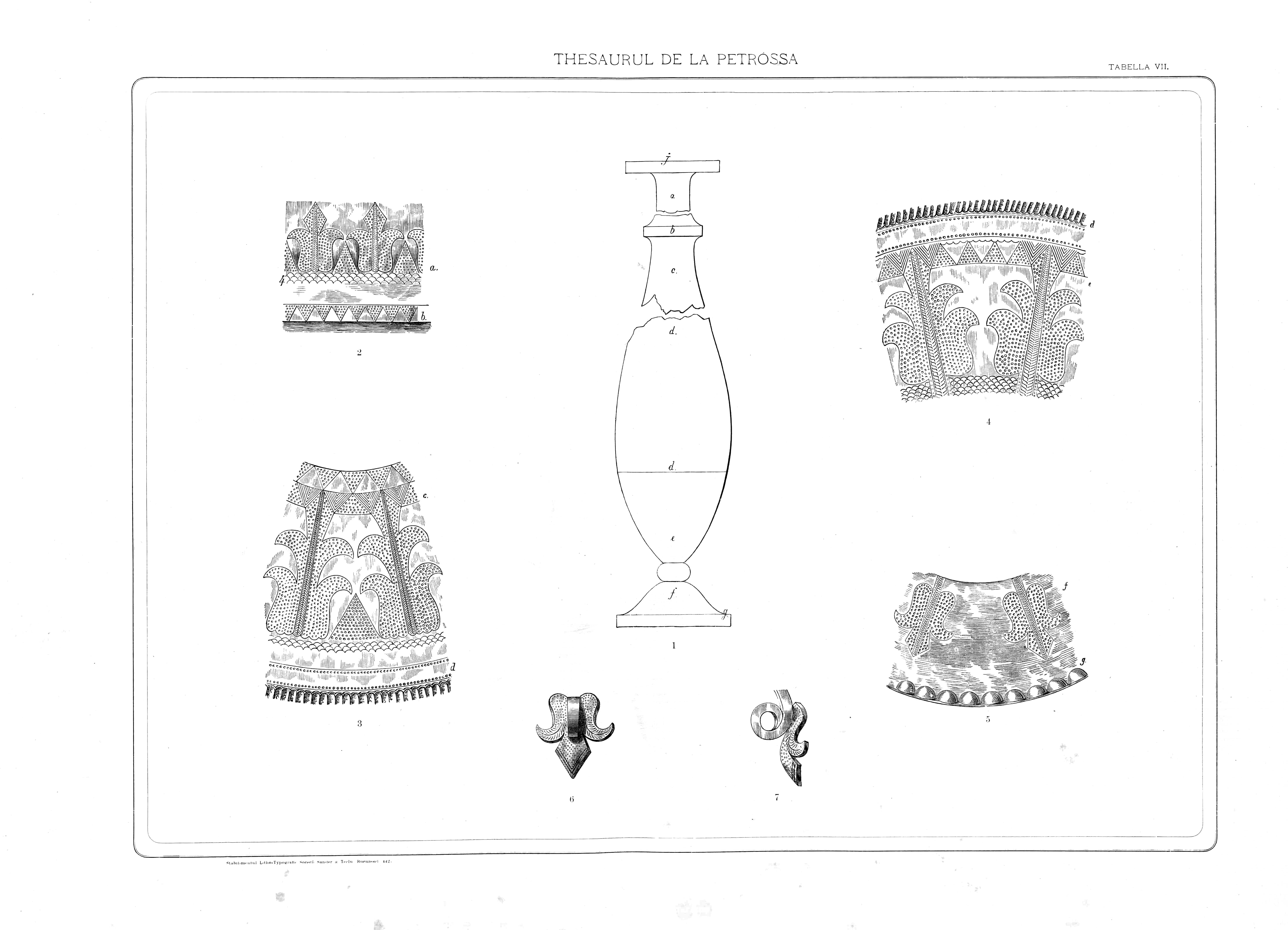 Ibricul - detalii, vas cu un singur mâner, în vechime: cenochoes. Înălțimea 36 centimetri, diametrul maxim 10, greutatea 1 kil. 7155.